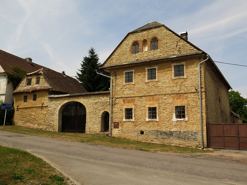 Usedlost čp. 16, Sedlec 16, Sedlec (Vraclav).